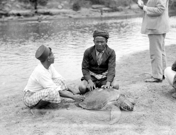 Repronegatief. Badjo's met gevangen schildpad aan de Sapébaai